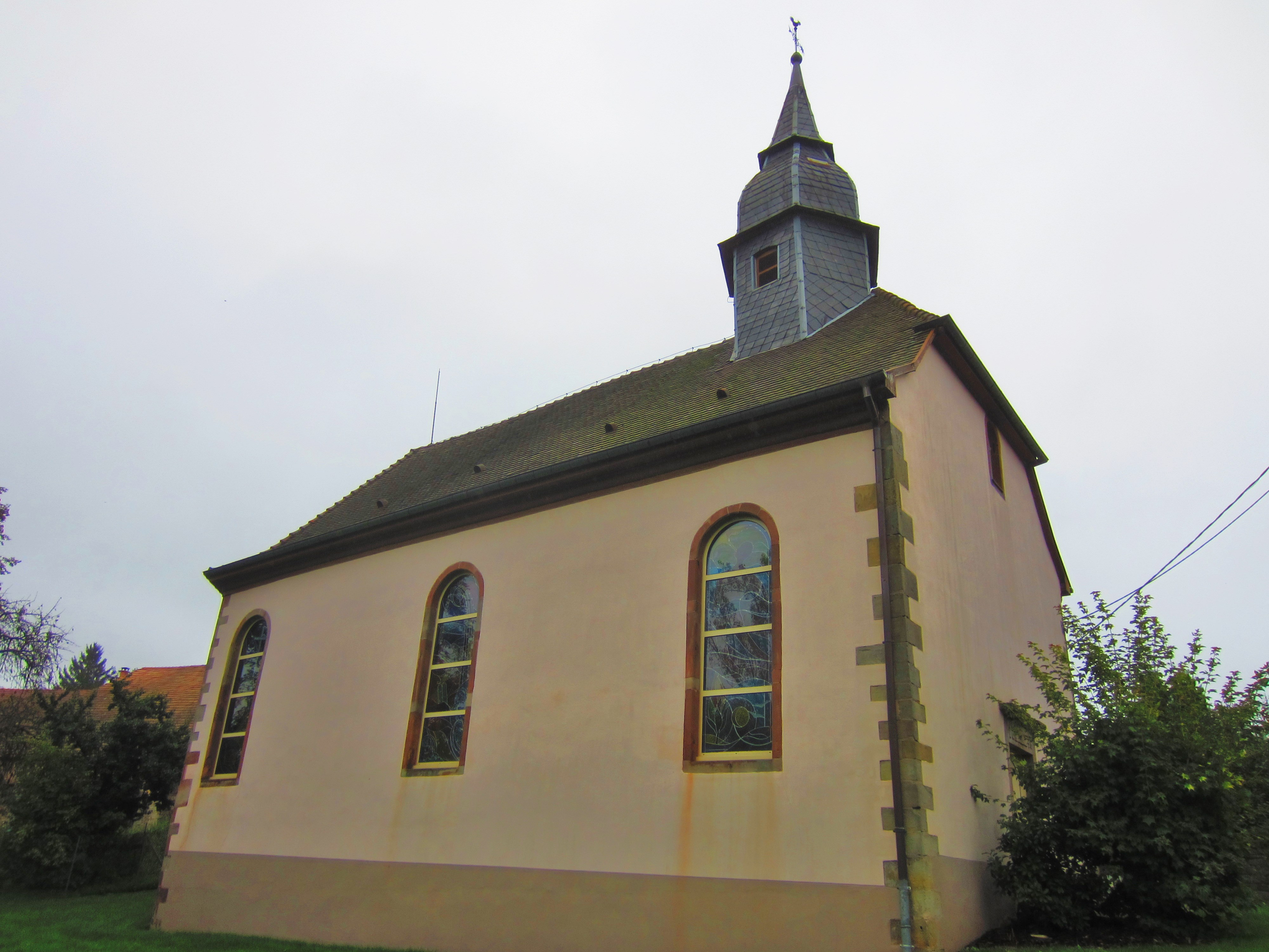 Temple Berling